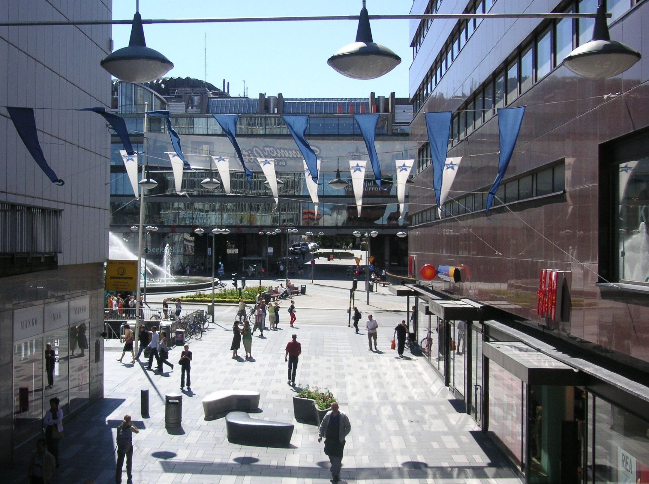 Hötorgscity, Sergelgatan och Sergels torg i Stockholm